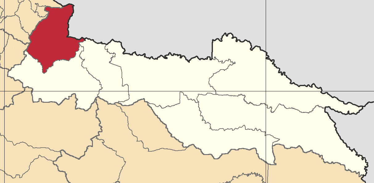 Mapa localizacor del cantón Sucumbíos, Sucumbíos, Ecuador